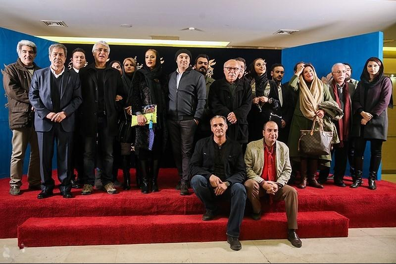 فجر ۳۵ - نشست خبری فیلم فِراری - نشست خبری فیلم فِراری به کارگردانی علیرضا داوودنژاد در چهارمین روز از سی‌و‌پنجمین جشنواره فیلم فجر‌ در‌ کاخ این جشنواره واقع در برج میلاد تهران برگزار شد. Template:3n